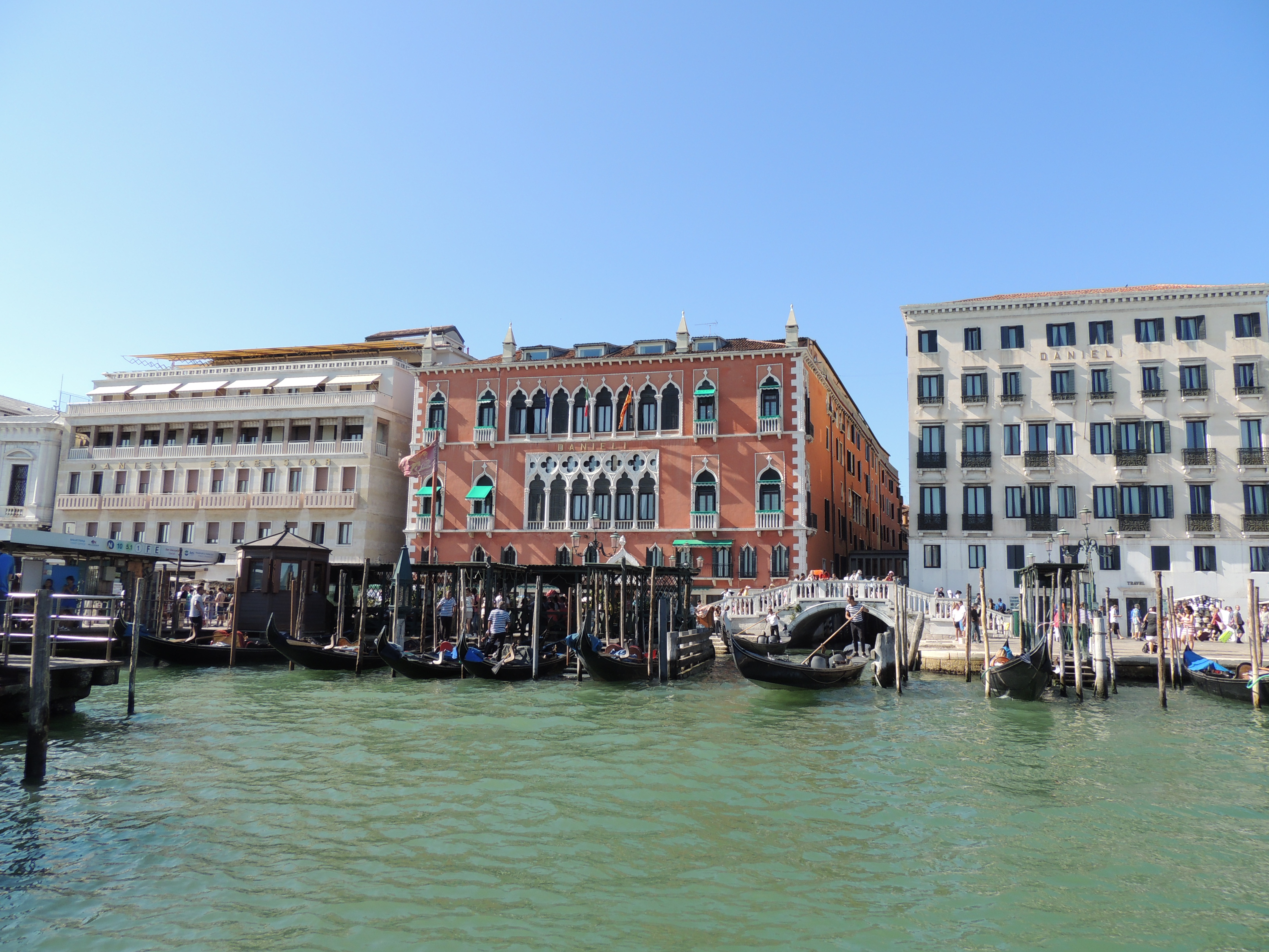 Hotel Danieli (Venice)